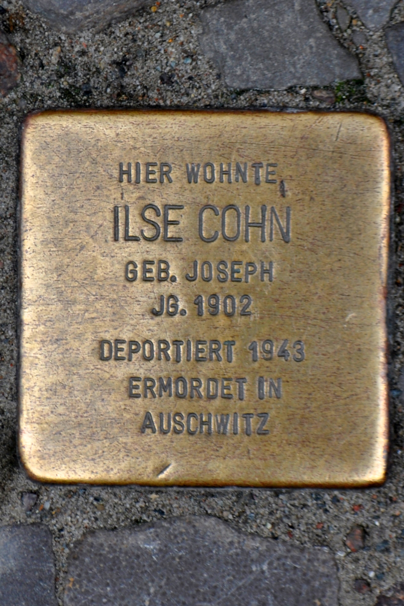 Stolperstein in Stralsund, Ossenreyerstraße 21/22. Der Stolperstein ist einer von fünf Stolpersteinen an dieser Adresse. Text: Hier wohnte Ilse Cohn geb. Joseph Jg. 1902 deportiert 1943 ermordet in Auschwitz